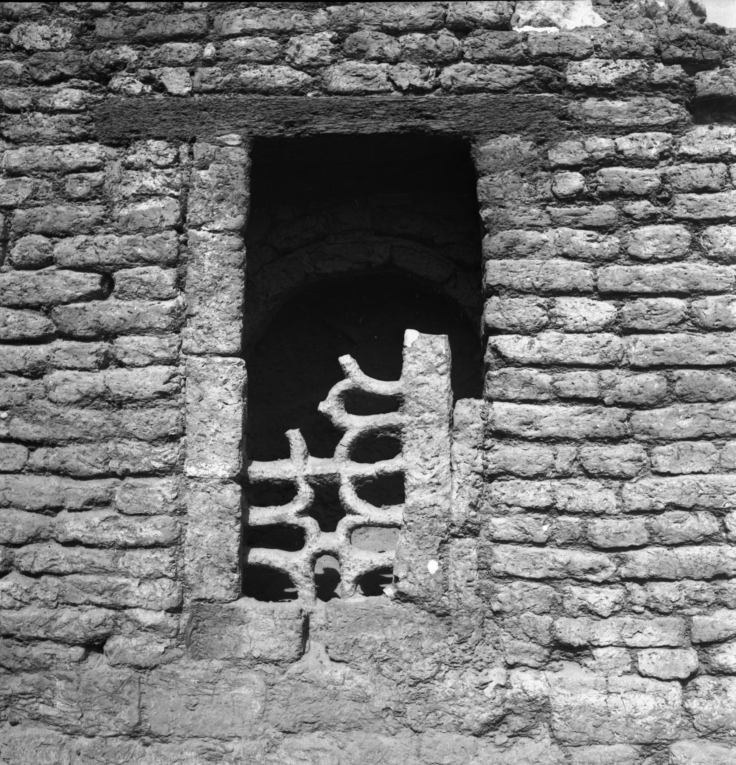 Wykopaliska w Faras